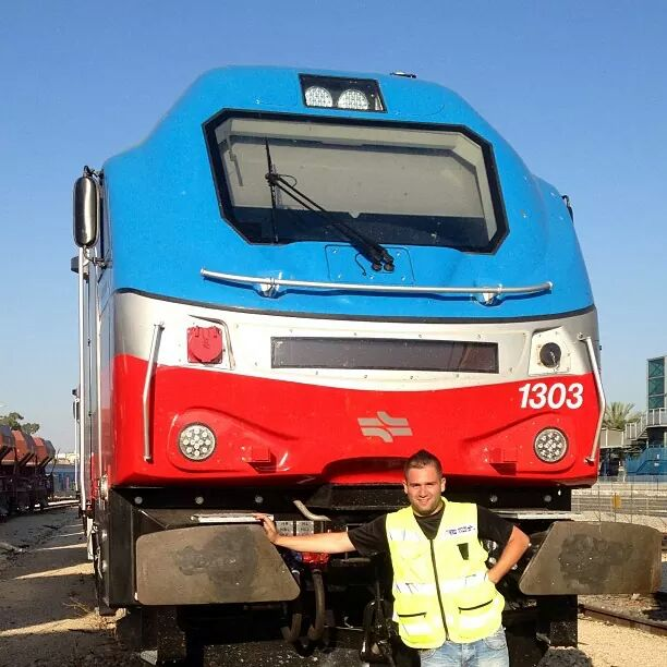 קטר של רכבת ישראל המצוייד במערכת האינדונזי